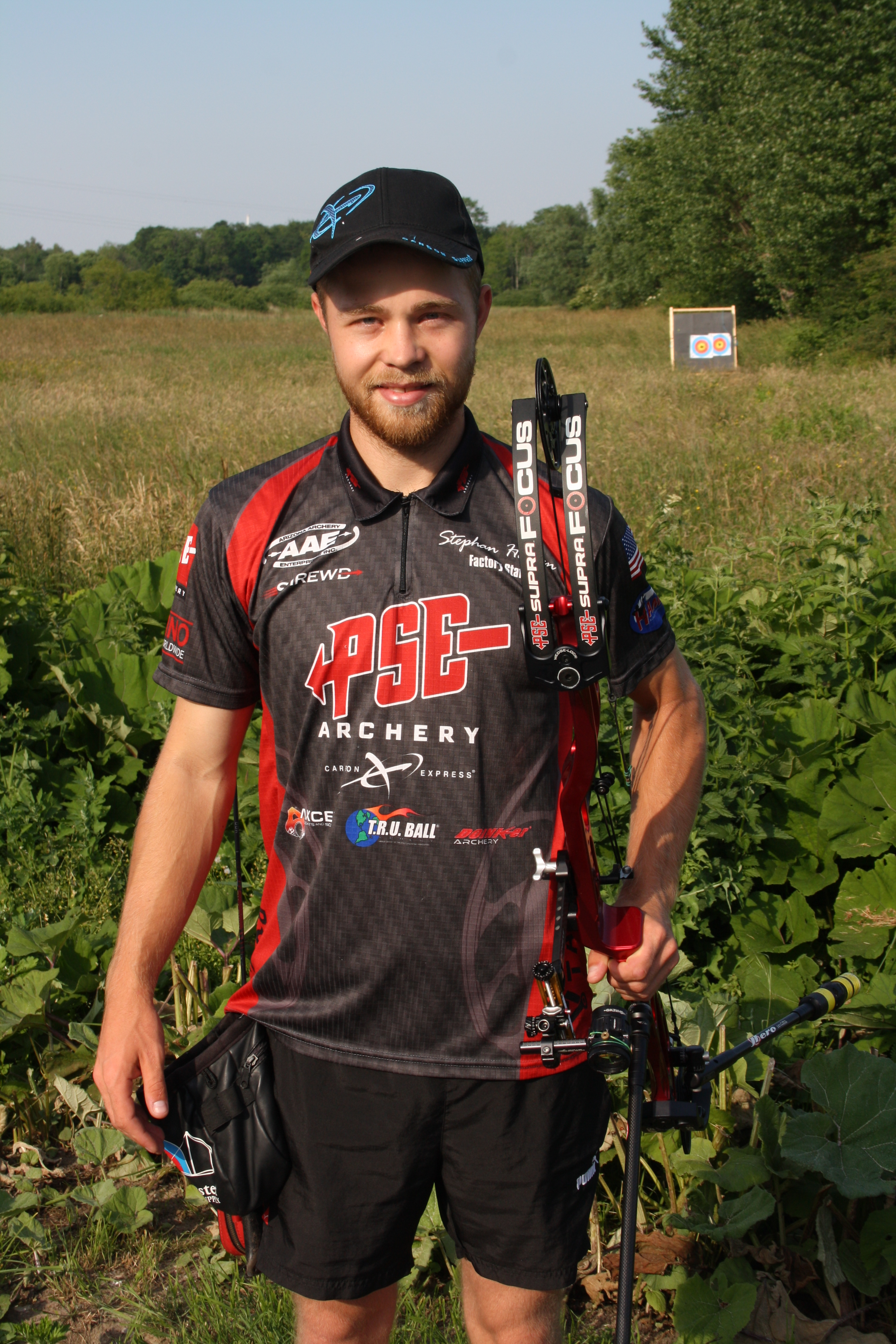 Stephan Hansen